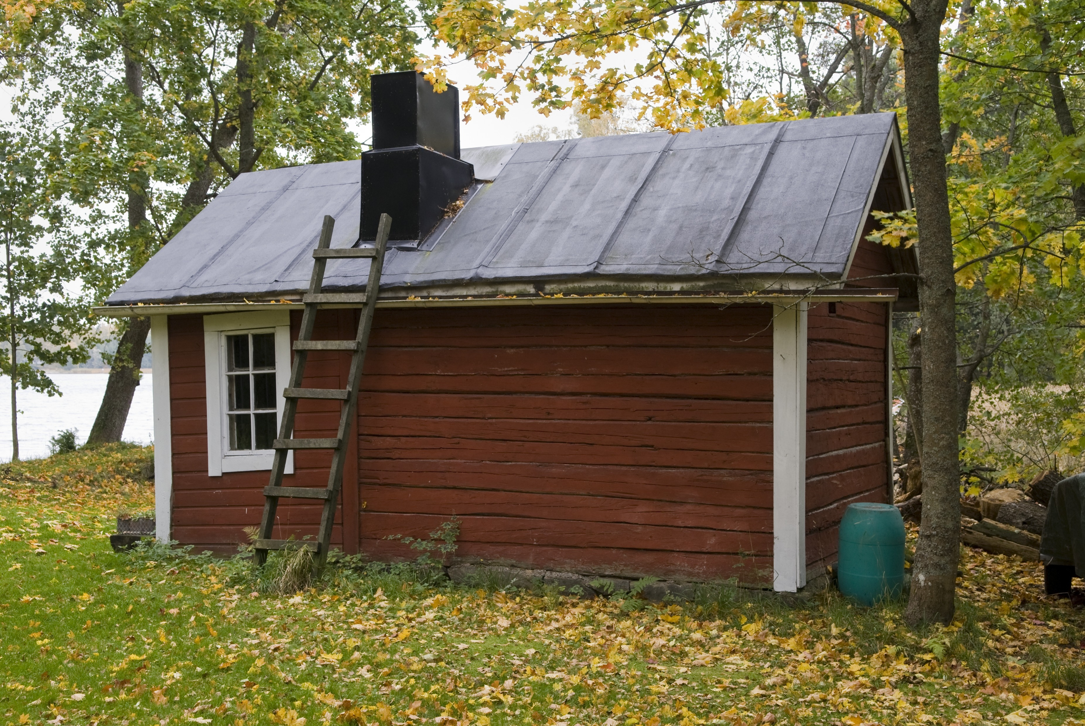 Degerön kartanon saunarakennus.